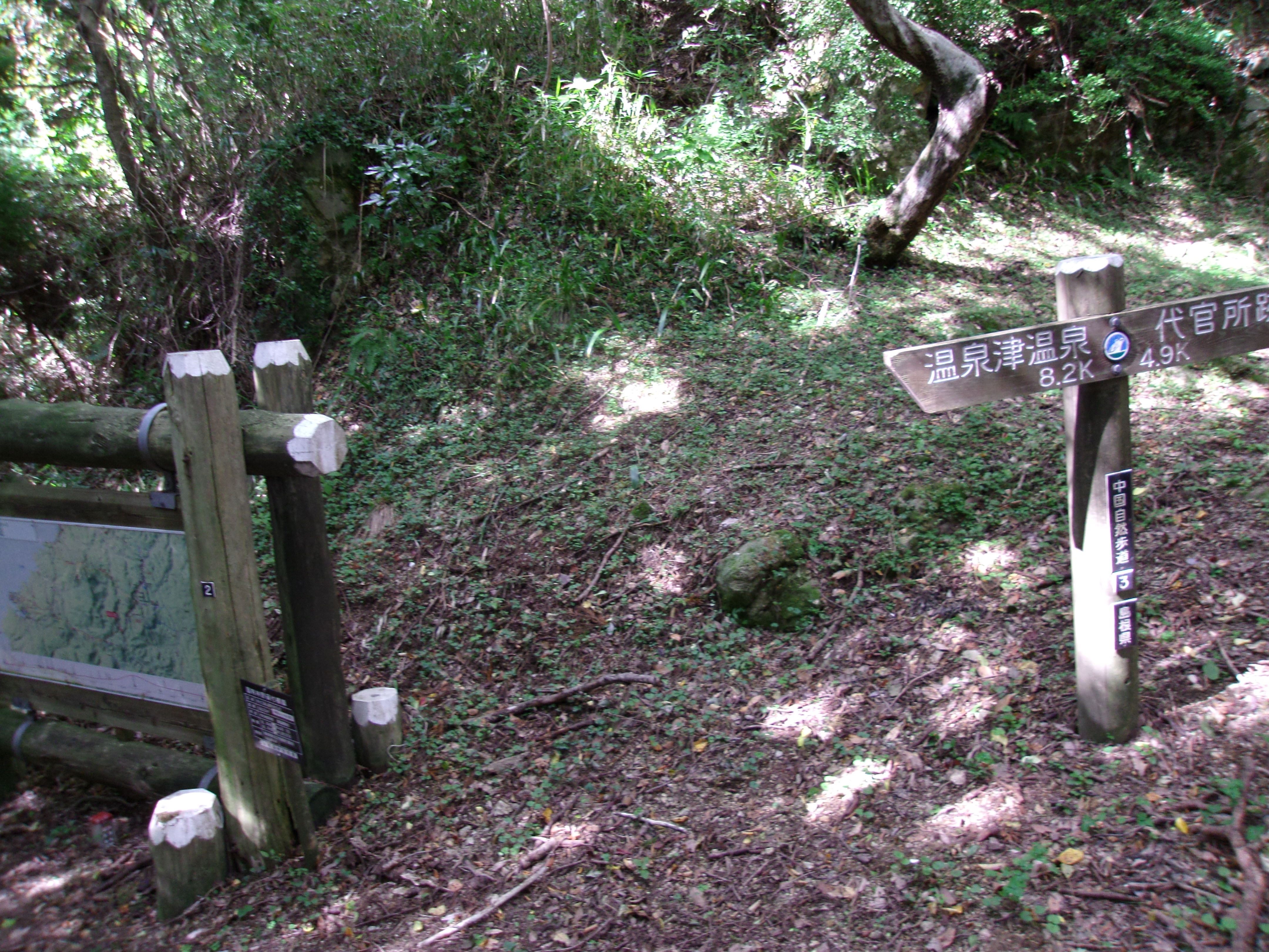 世界遺産「石見銀山」の構成資産である銀山街道温泉津沖泊道 降路坂峠の頂上、標高429ｍ